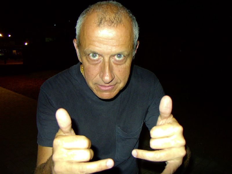 Miki Gonzalez